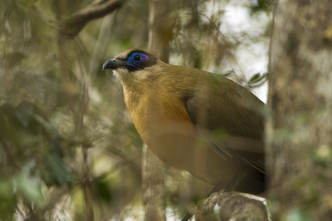 Giant Coua - Zombitse - Madagascar_S4E8507